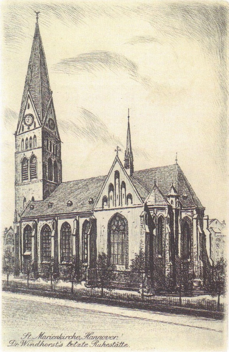 Katholische Kirche St. Marien, Hannover, Zeichnung (Postkarte) vor 1900